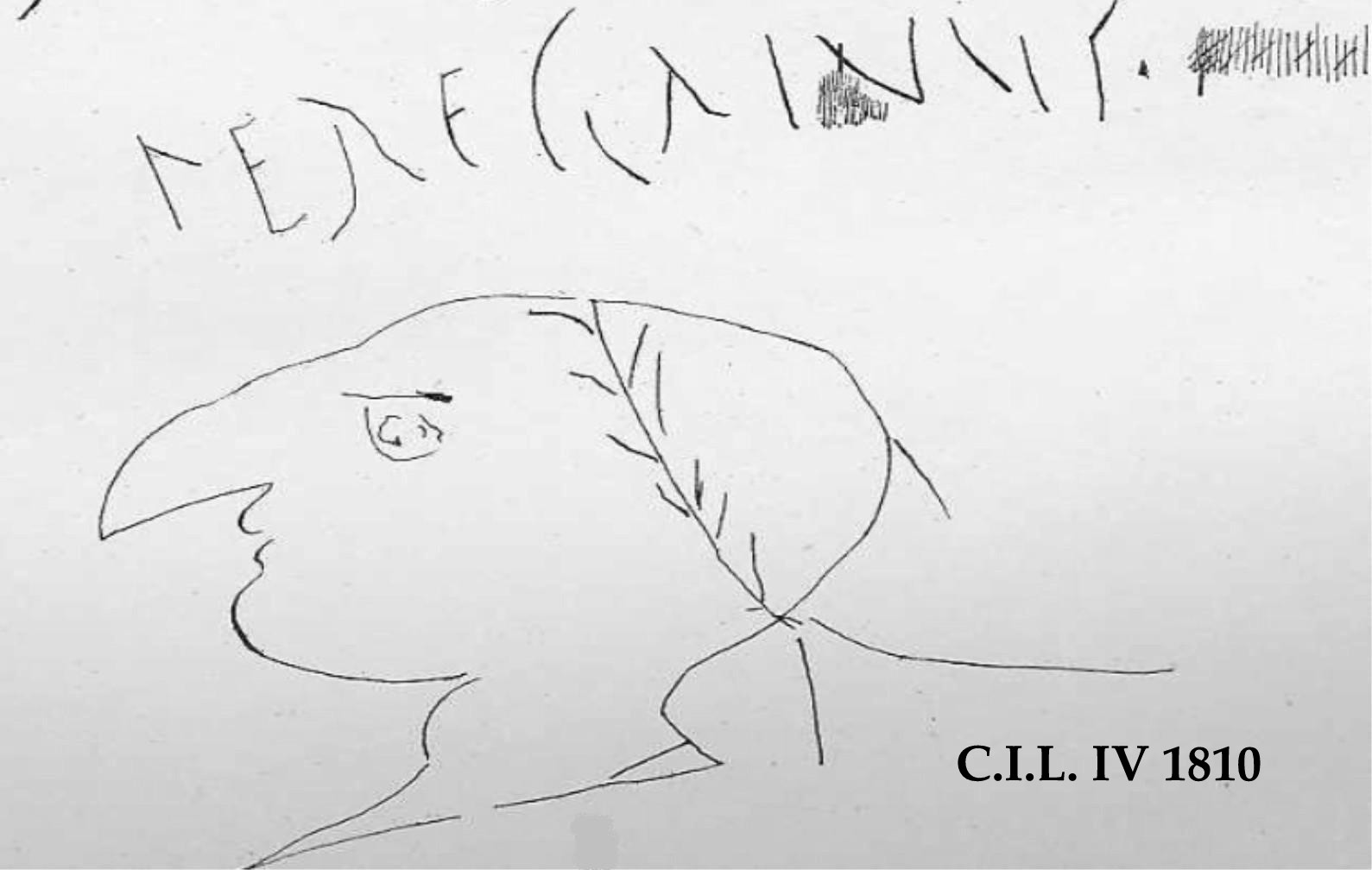 Inscripción pompeyana